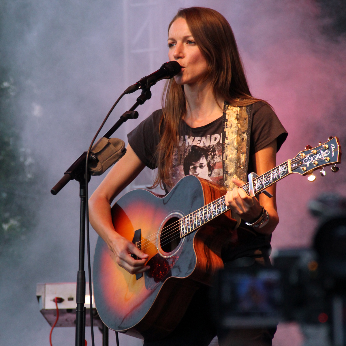 Zuzana Smatanová na Porcinkule 2014 v Nových Zámkoch